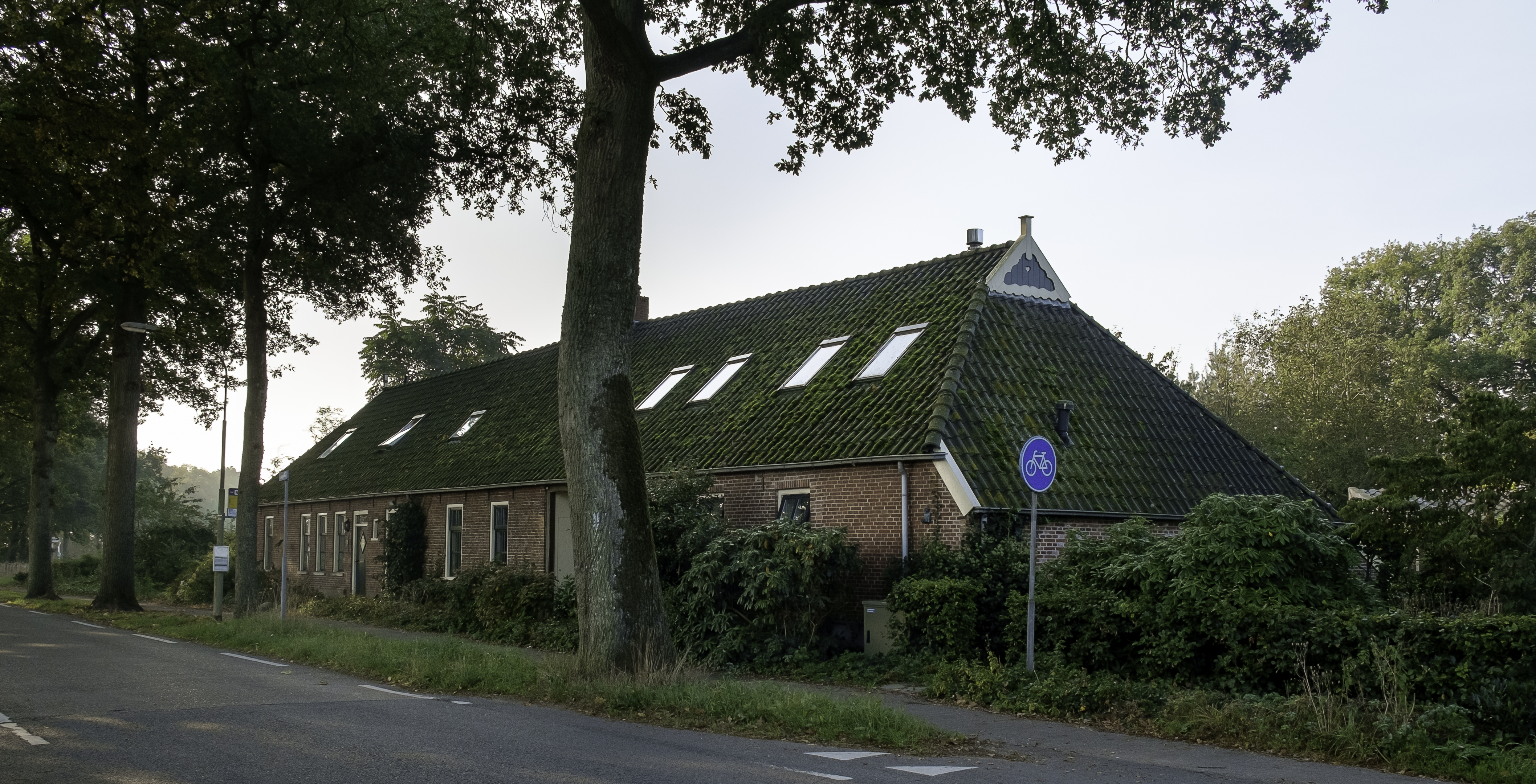 Korte jammer, voormalig armenhuis van Noordlaren